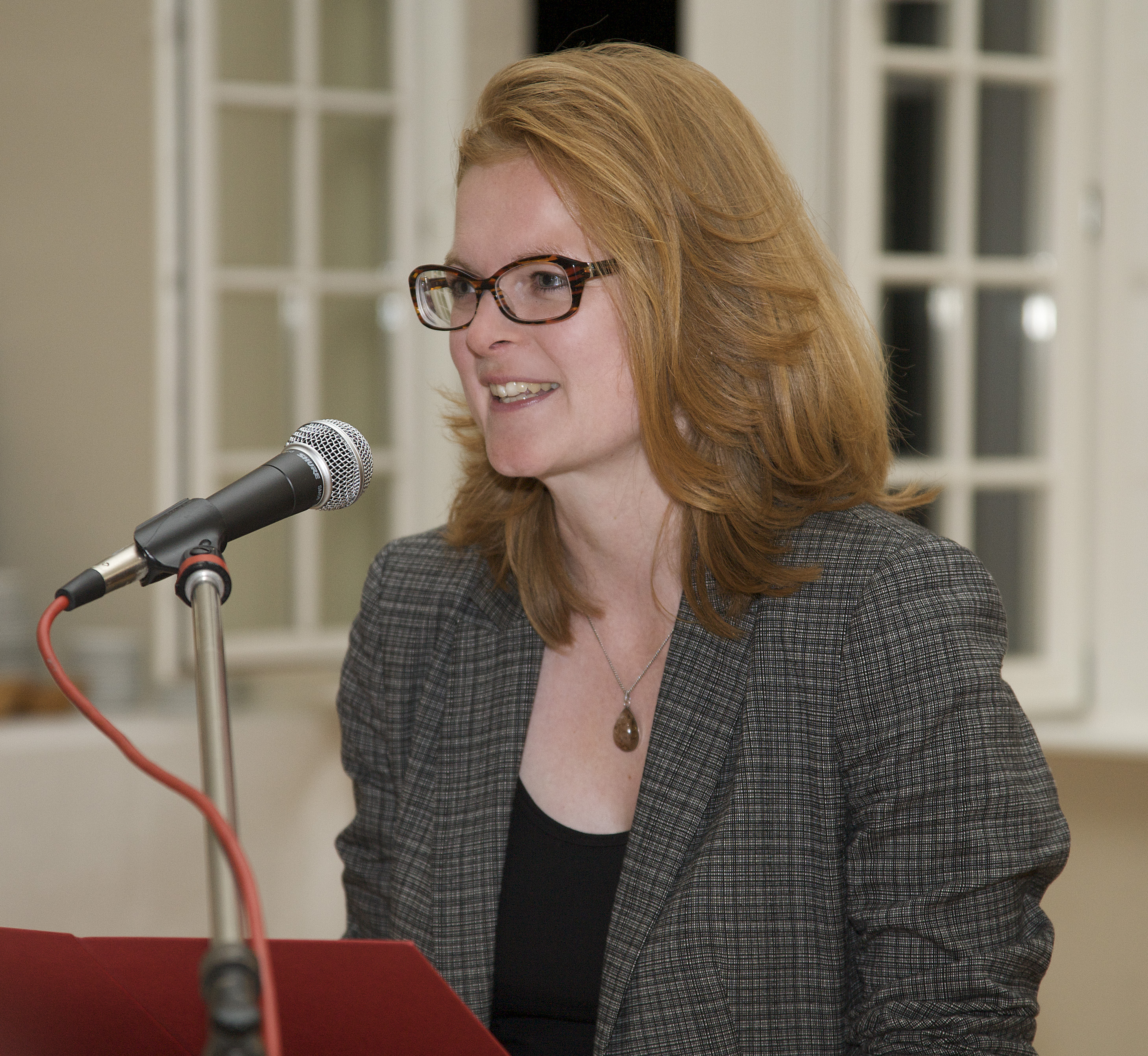 Isabel Rohner am Mikrofon